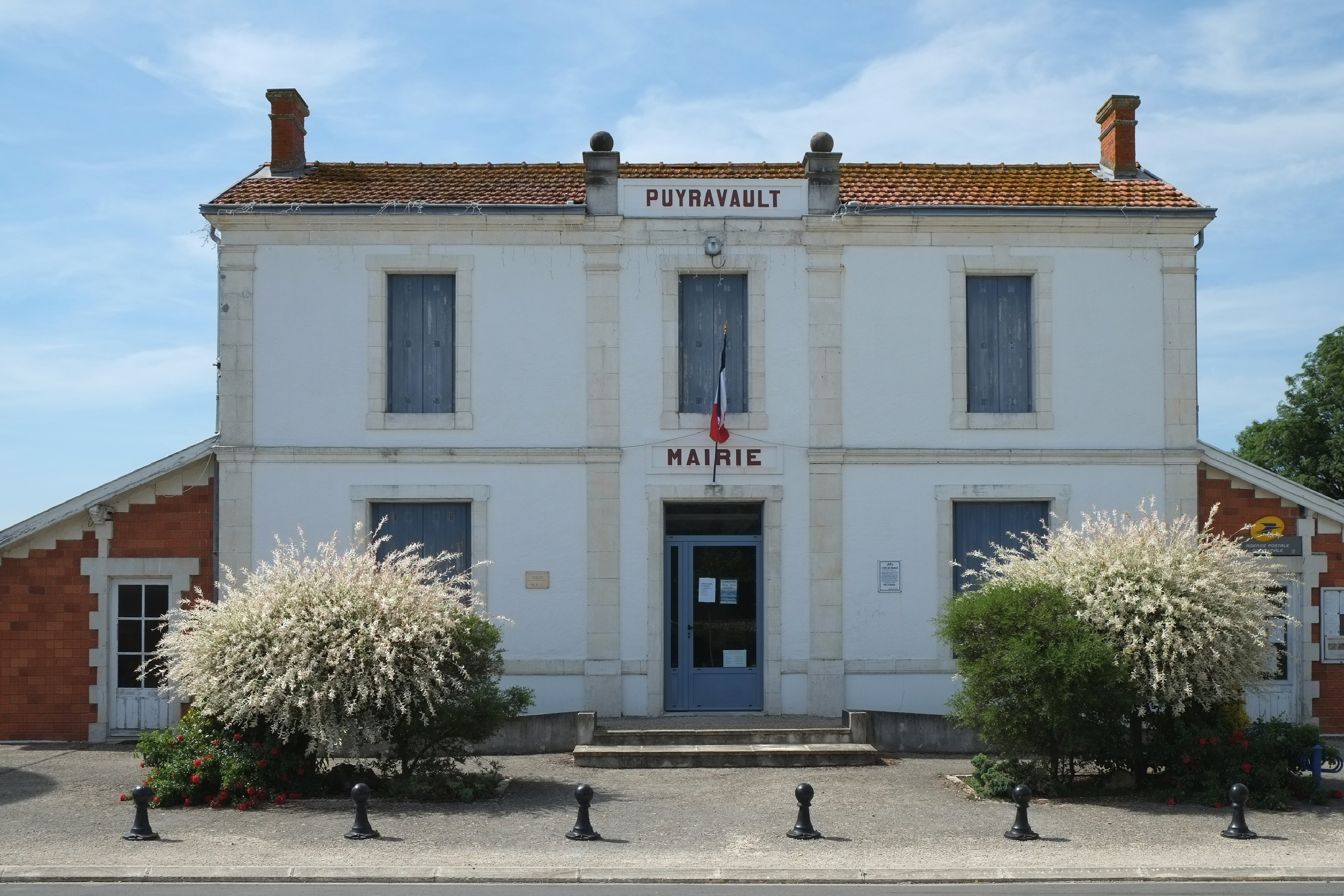 Mairie Puyravault Charente-Maritime France